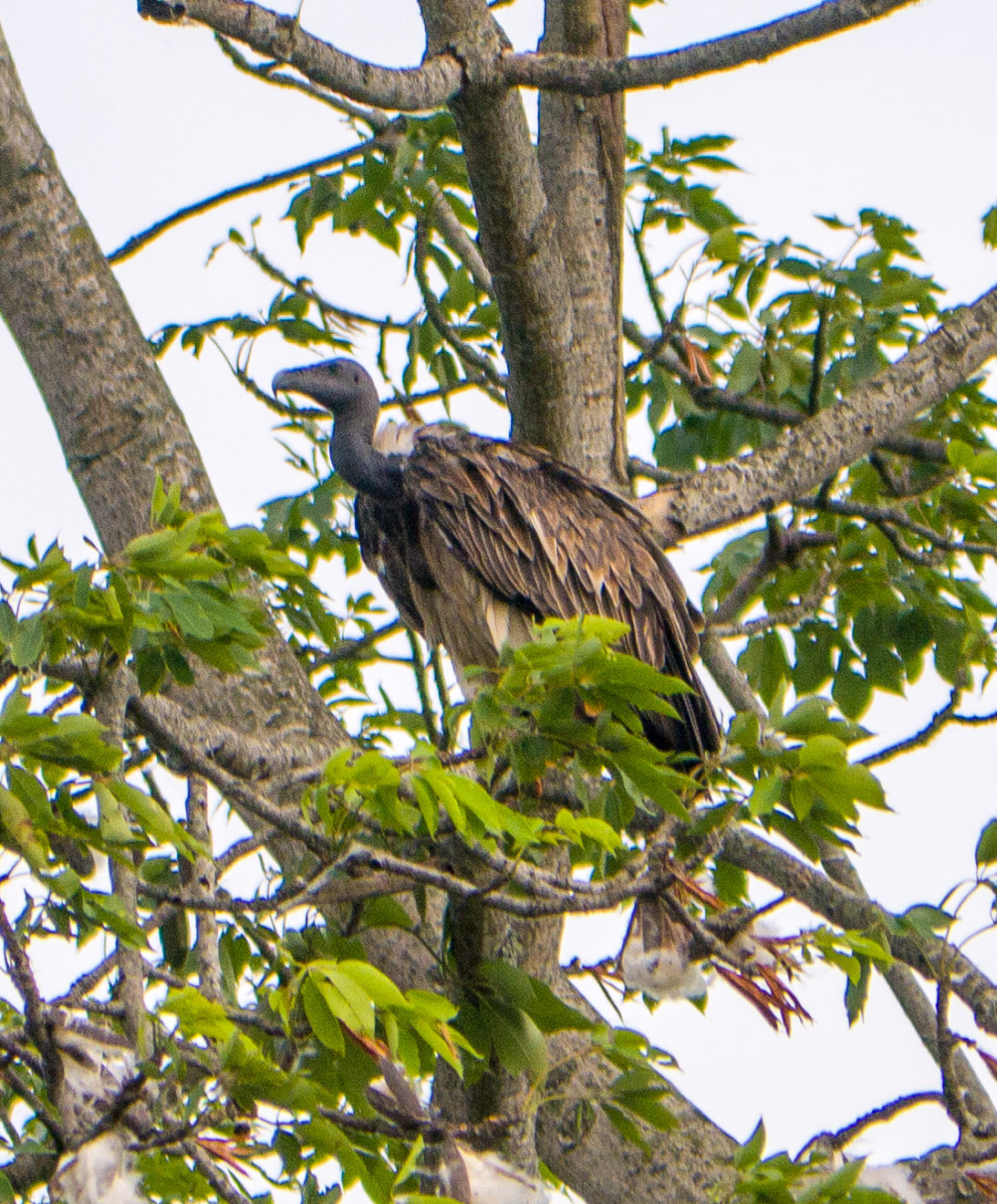 Slender-billed Vulture, Mishmi Hills, India